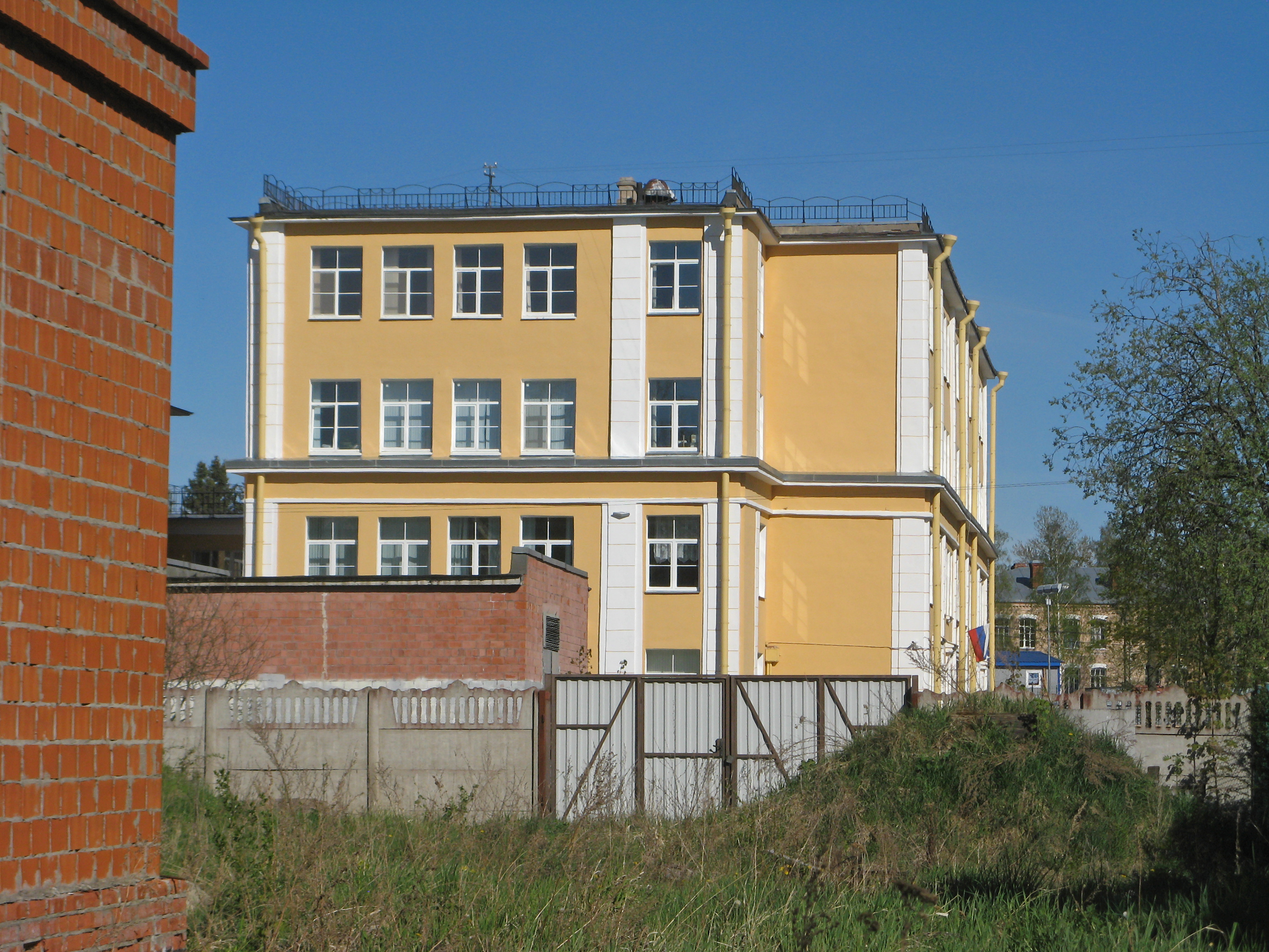 Ломоносов, школа № 429 (вид от Иликовского проспекта)